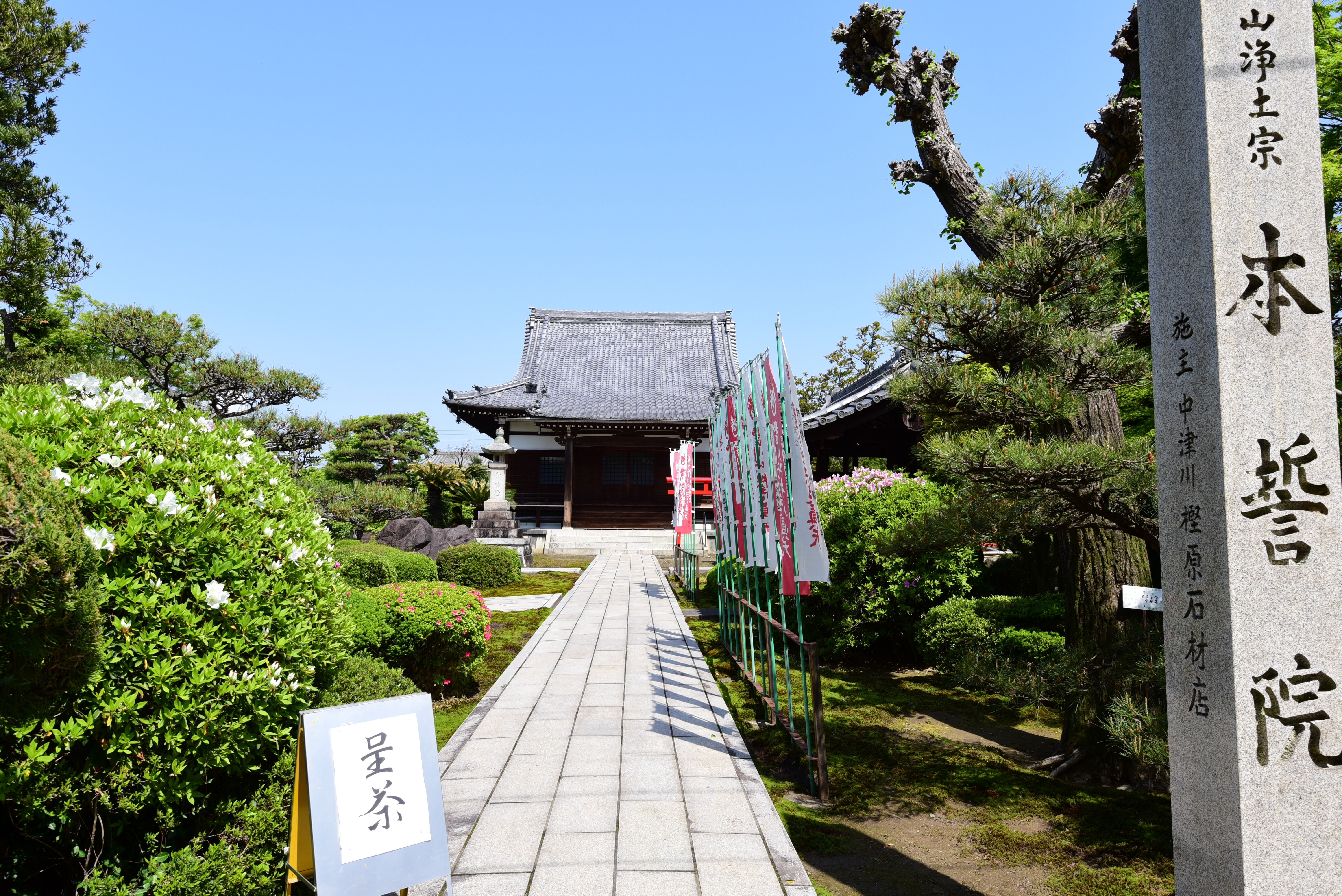 蜂須賀家政が幼少時に勉学した本誓院